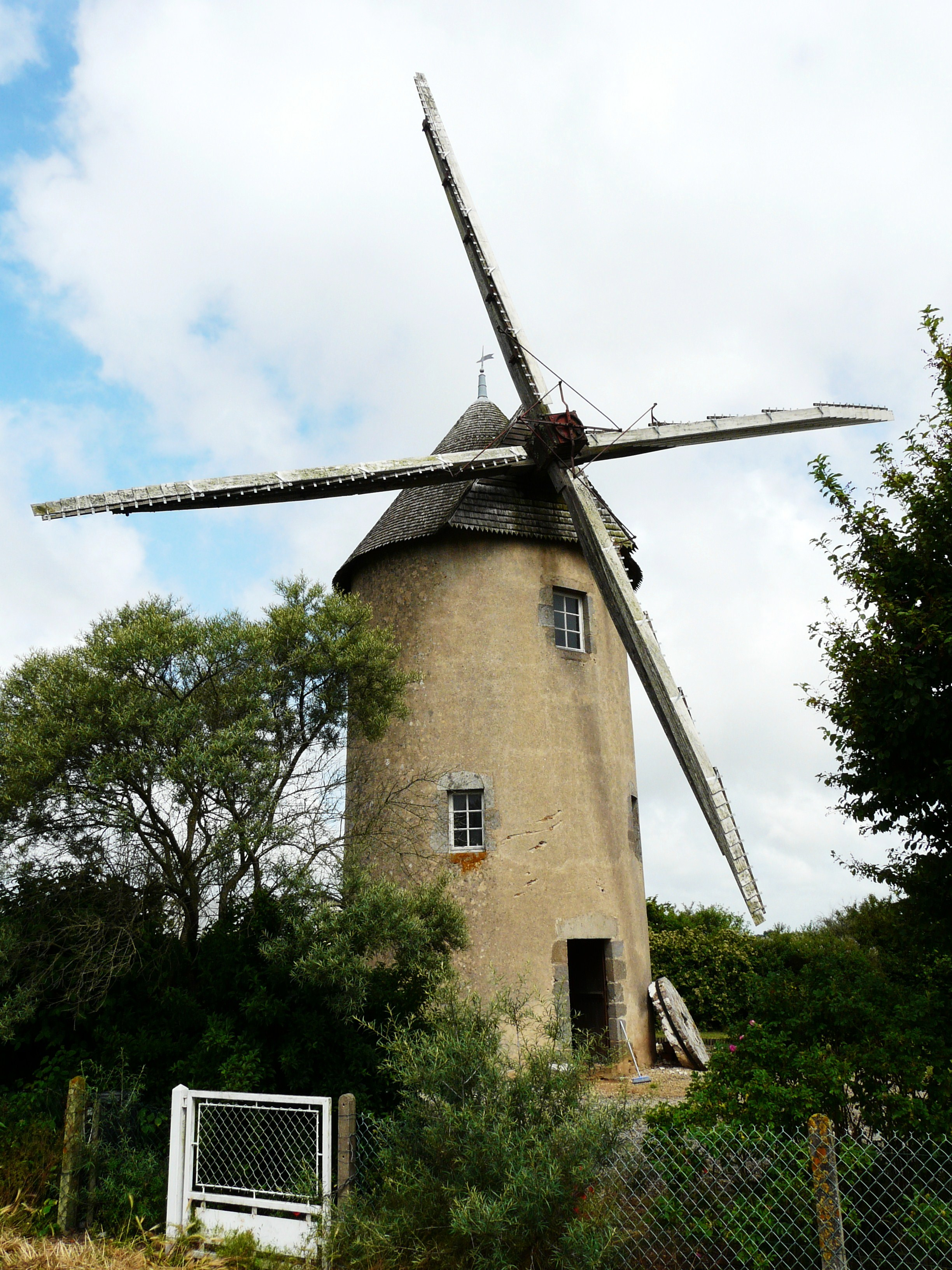 Moulin à vent, Argenton-les-Vallées, Deux-Sèvres, France